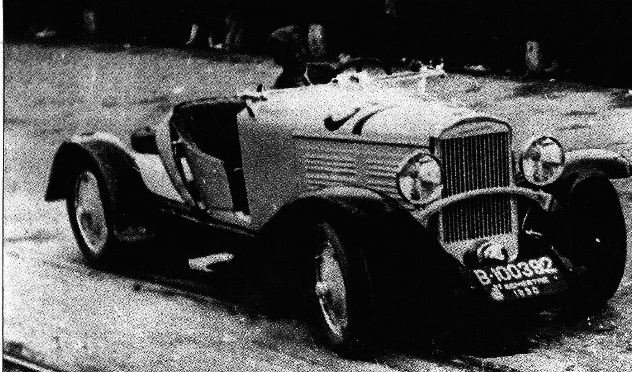 Une automobile Nacional Pescara. Photographie diffusée sur les dépliants de présentation Nacional Pescara.